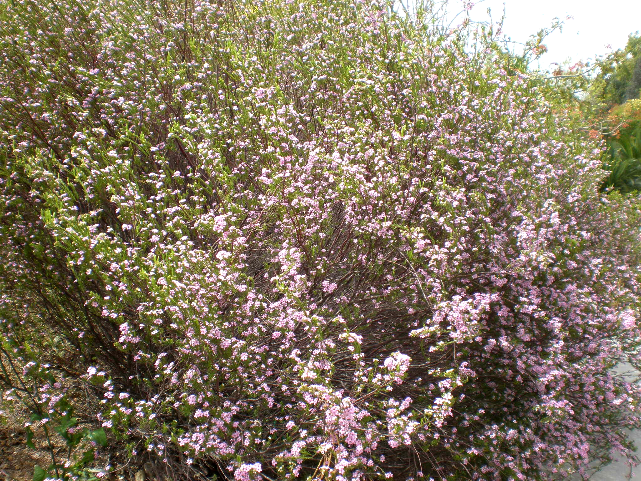 Jardín Botánico de Barcelona.